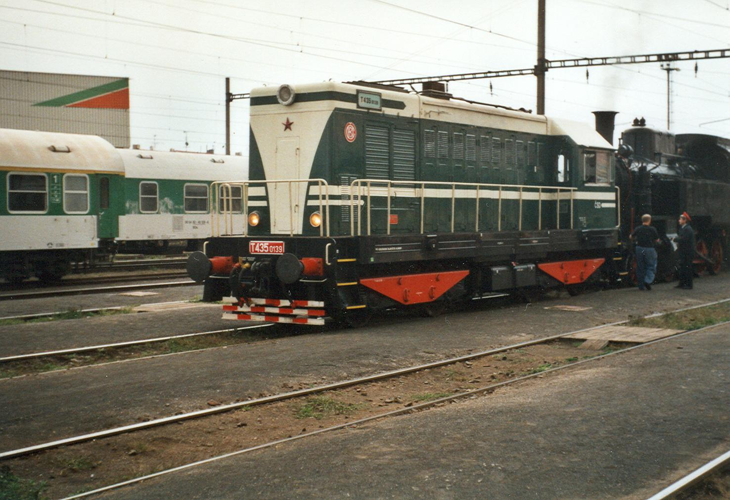 T 435.0139 als Museumslokomotive im Bahnhof Chomutov